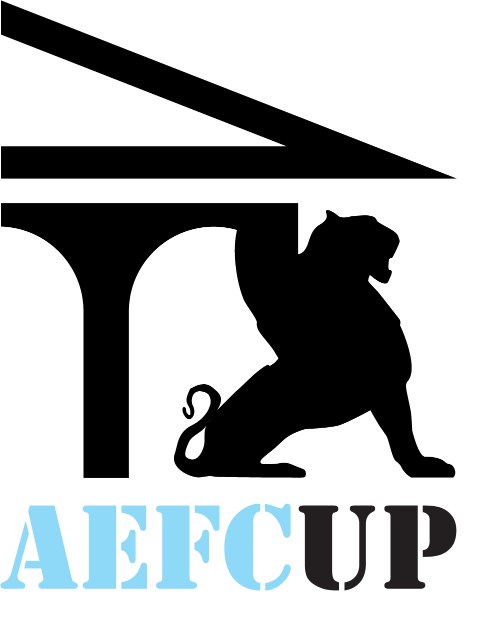 Logótipo da Associação de Estudantes da Faculdade de Ciências da Universidade do Porto (AEFCUP).